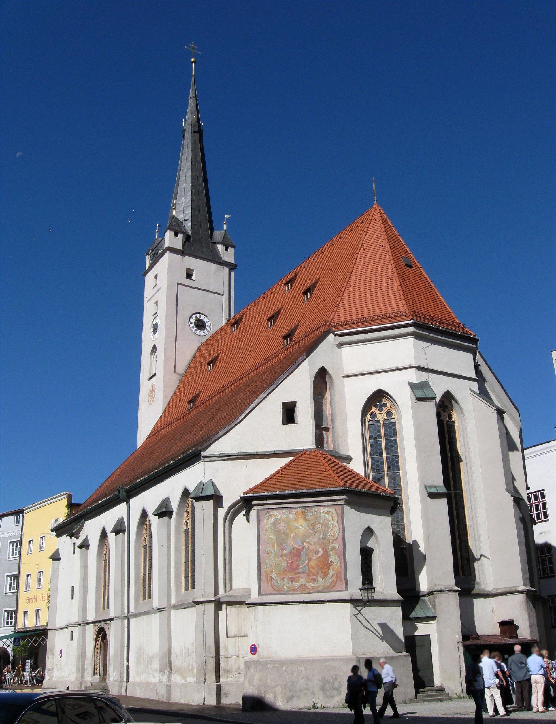 Marienplatz 4; Marienplatz 4 a. Kath. Kirche Unserer Lieben Frau, verputzter Backsteinbau, dreischiffige gotische Staffelhallenkirche, 1. Hälfte 14. Jh., Einwölbung 1386, Turmhelm von Wolfgang Wiser 1501/02, Barockisierung des Inneren 1753; mit Ausstattung.